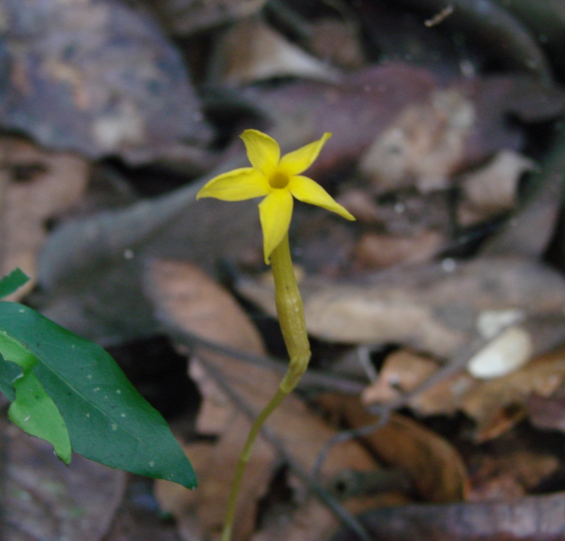 Voyria aphylla - GENTIANACEAE Estação Ecológica do IBGE - Brasília - Distrito Federal - Brasil